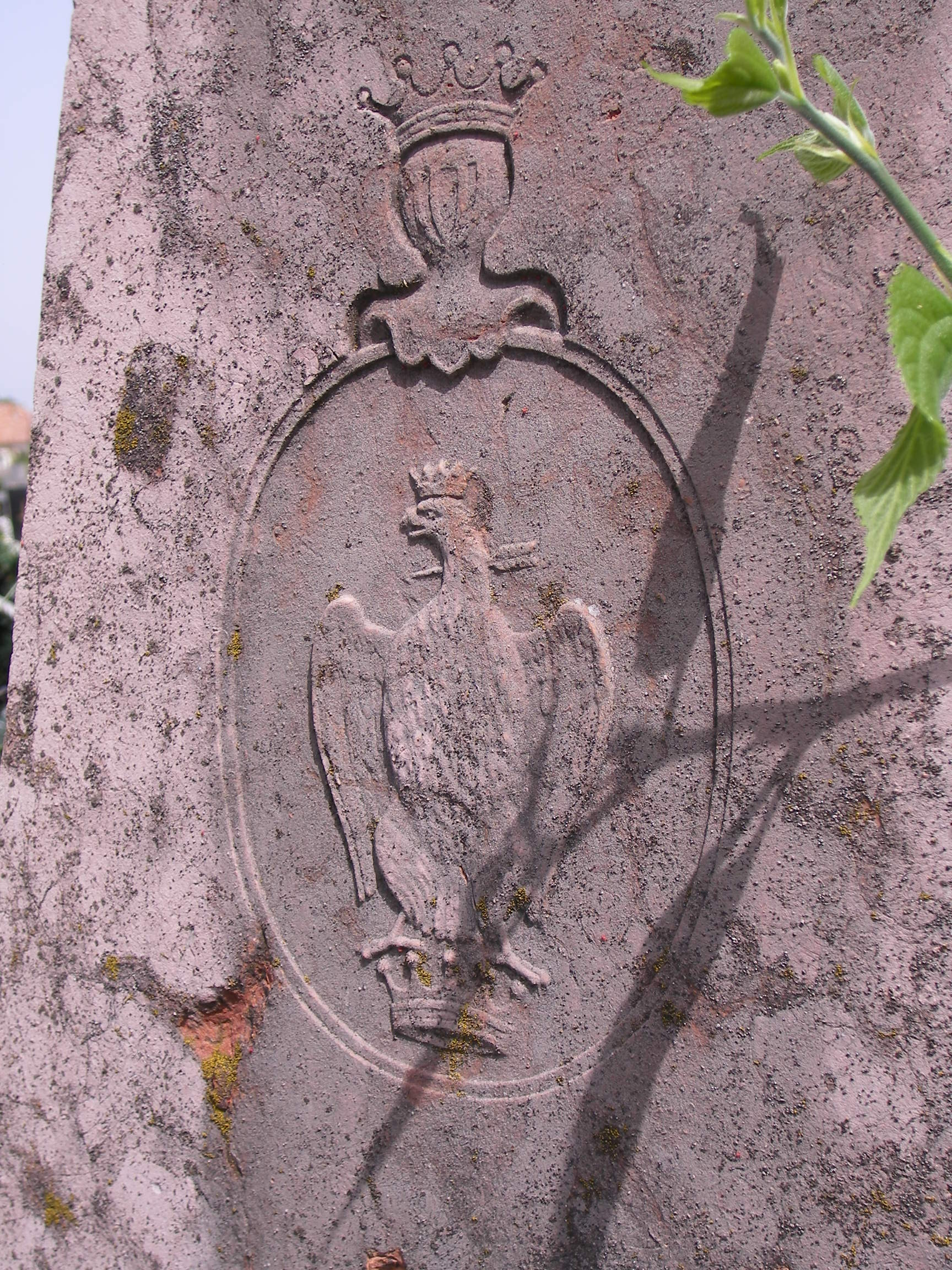 Bagota - az Ordódy-család címere a temetőben